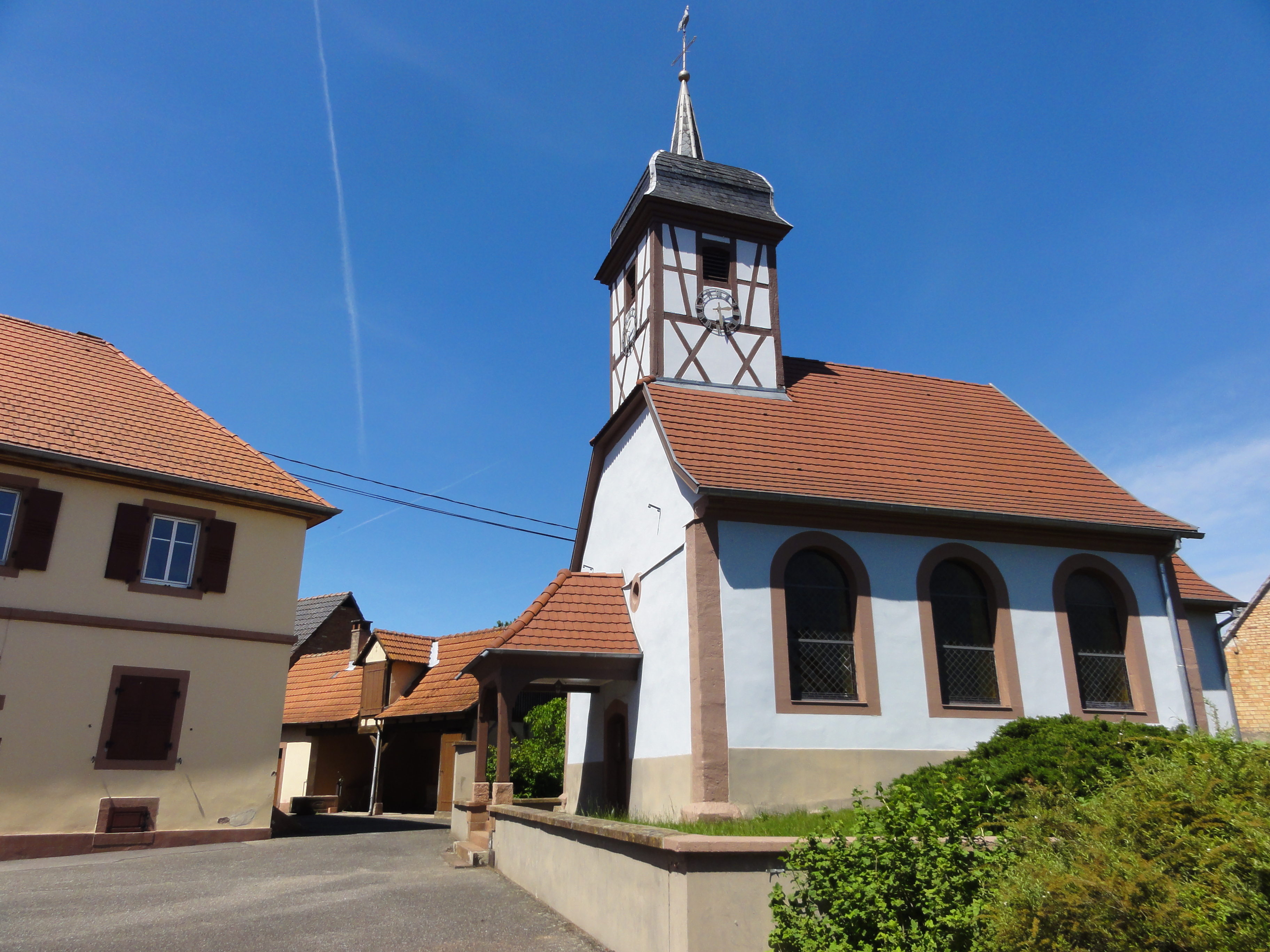 Église simultanée Saint-Jean-Baptiste (1762) d'Uttenhoffen, Alsace, Bas-Rhin.